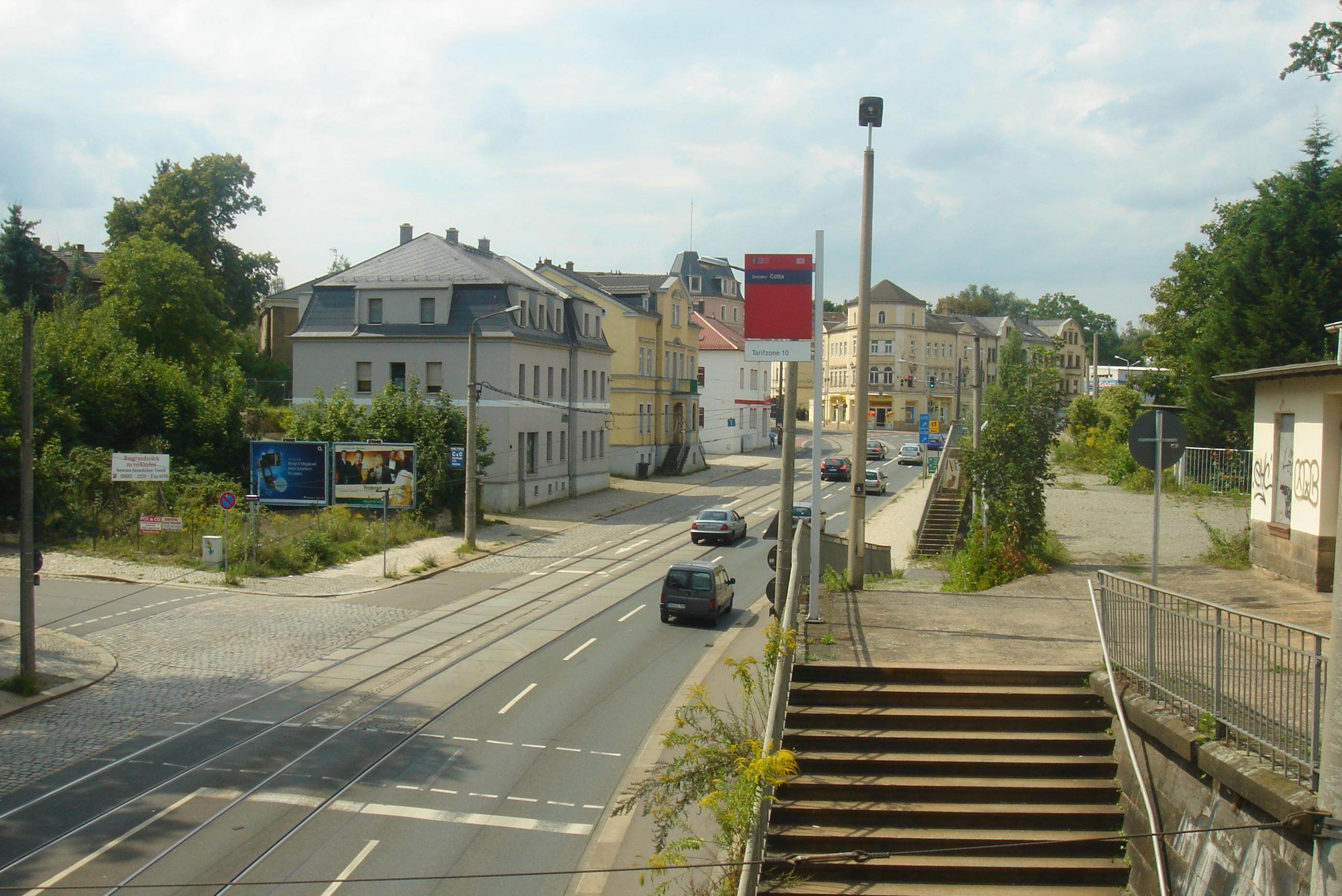 Blick vom Haltepunkt Dresden-Cotta an der Bahnstrecke Berlin-Dresden auf die Hamburger Straße in Richtung Warthaer Straße